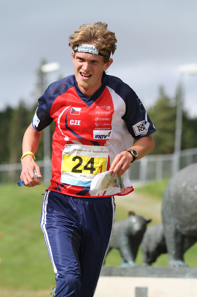 Relay at WOC2010